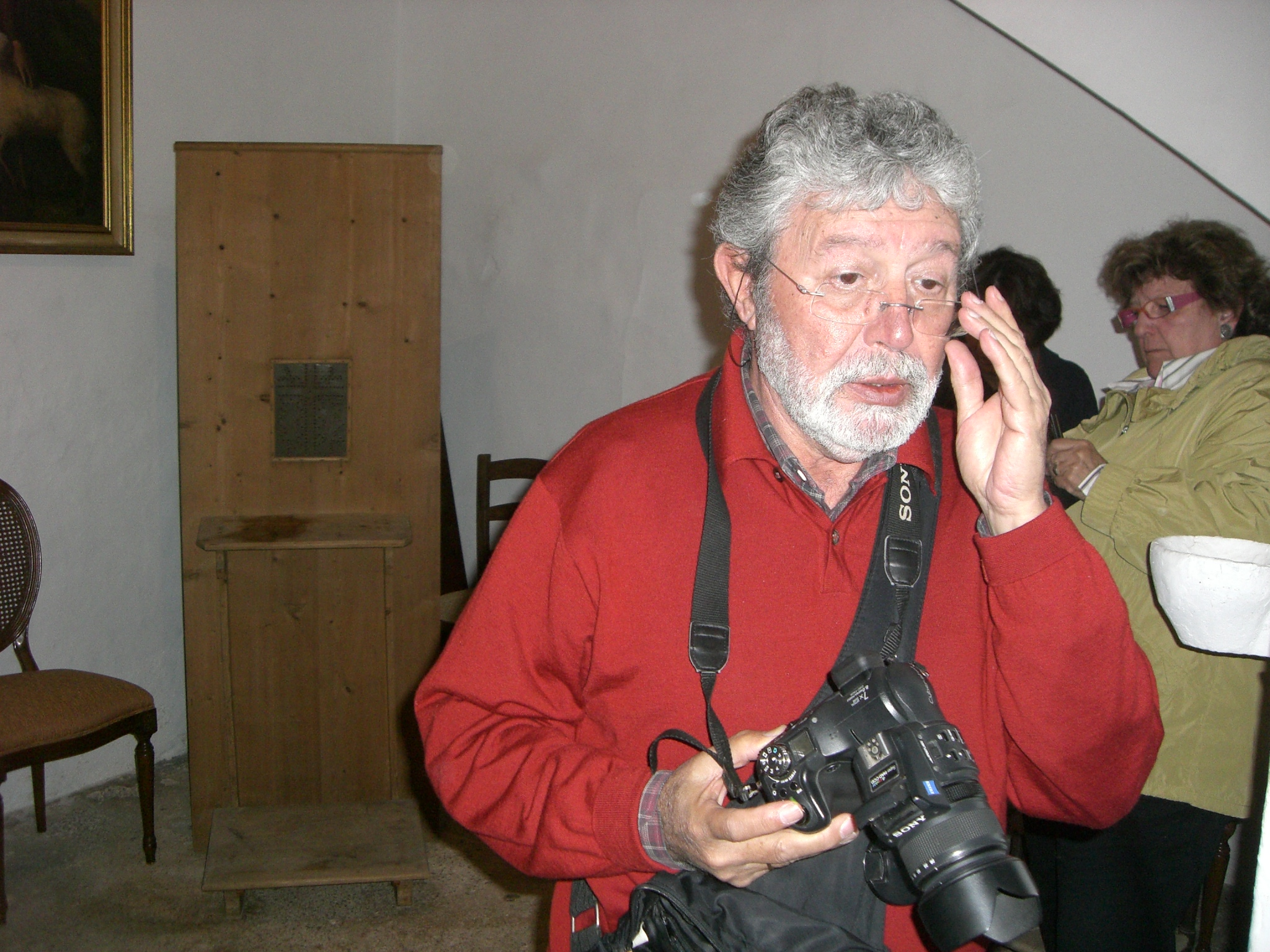 El fotògraf mallorquí Toni Catany